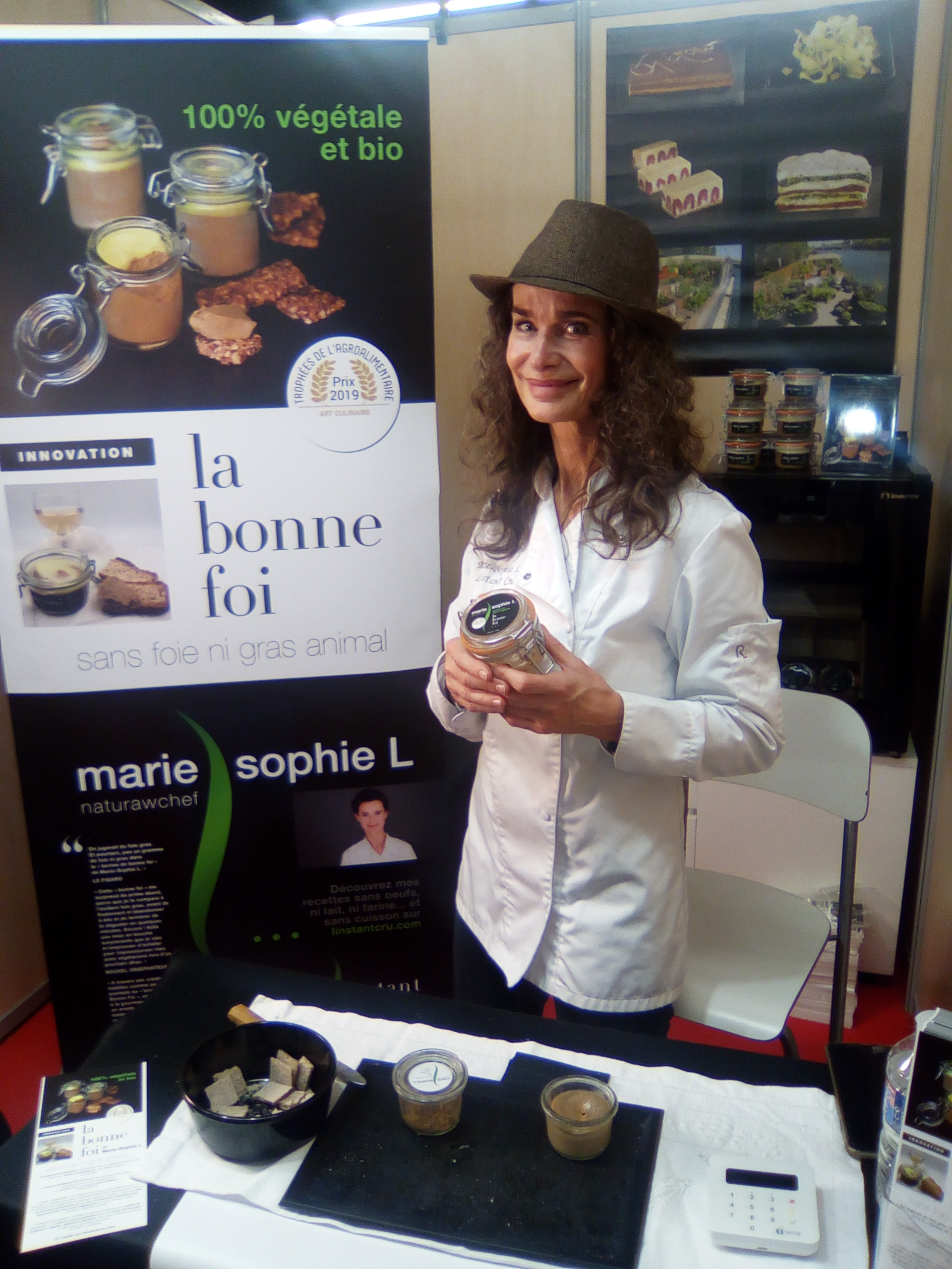 Marie-Sophie L. vendant sa terrine végétale au salon Saveurs des plaisirs gourmands.